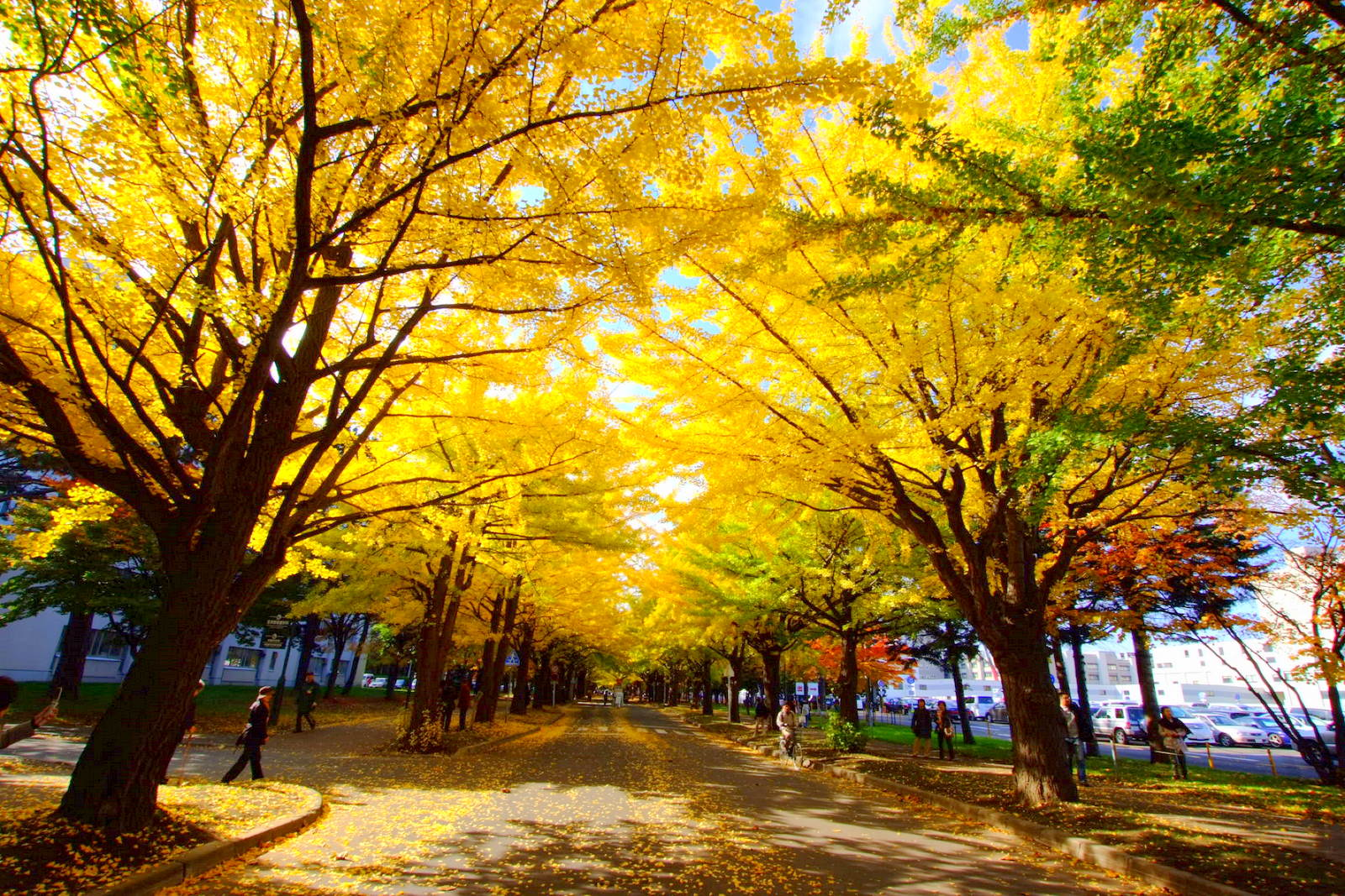 北海道大学(Hokkaido University)